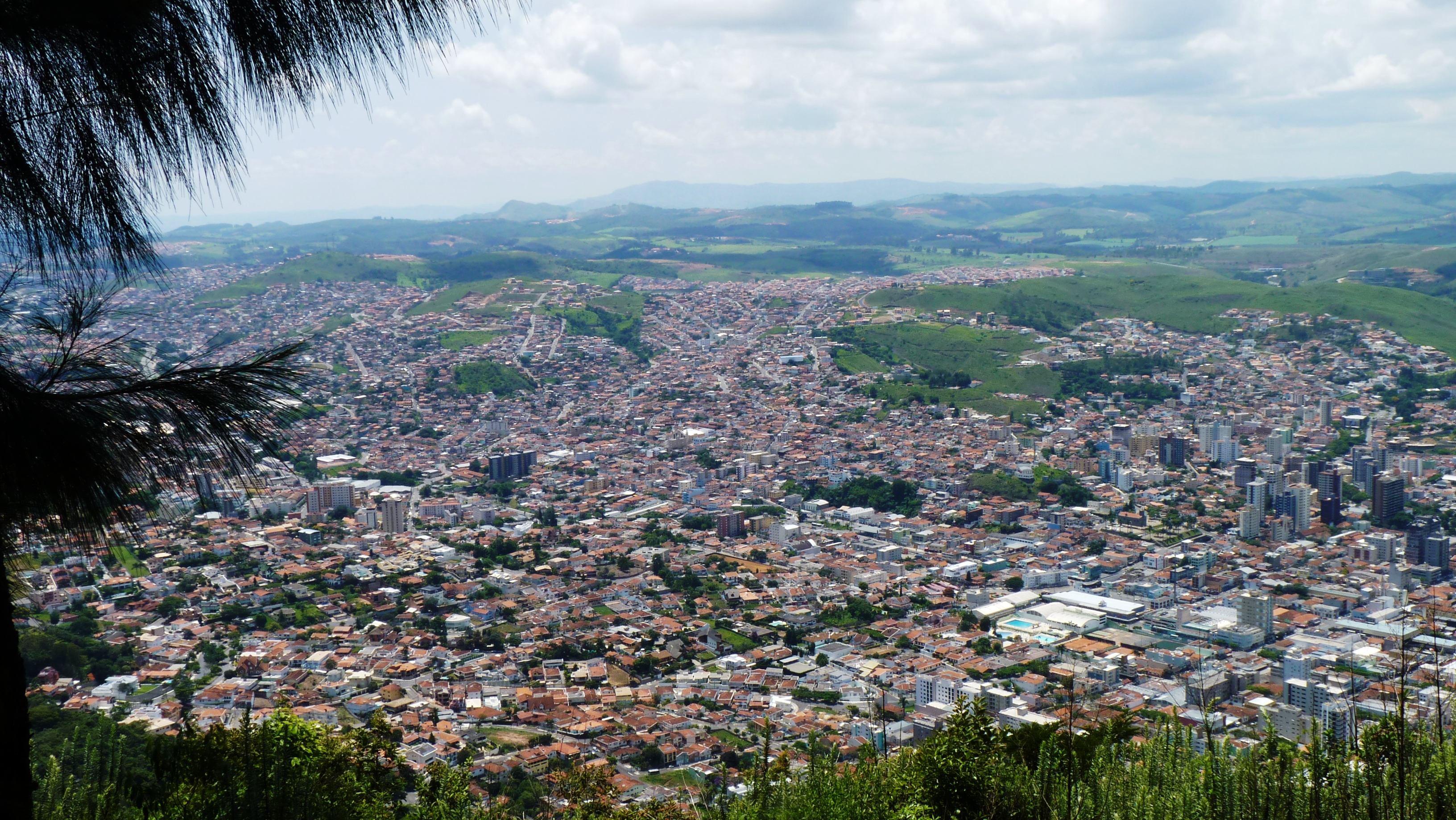 Minas Gerais